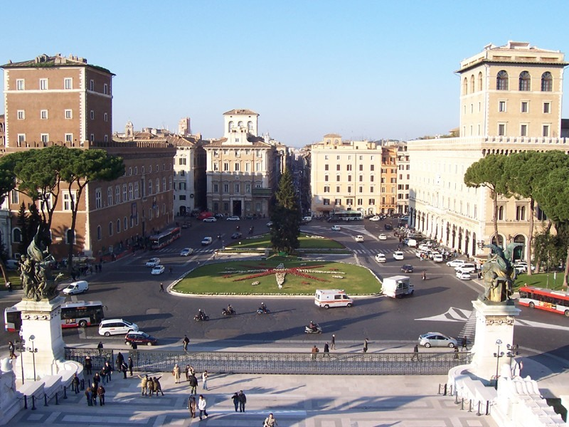 Roma - Piazza Venezia vista dal Vittoriano